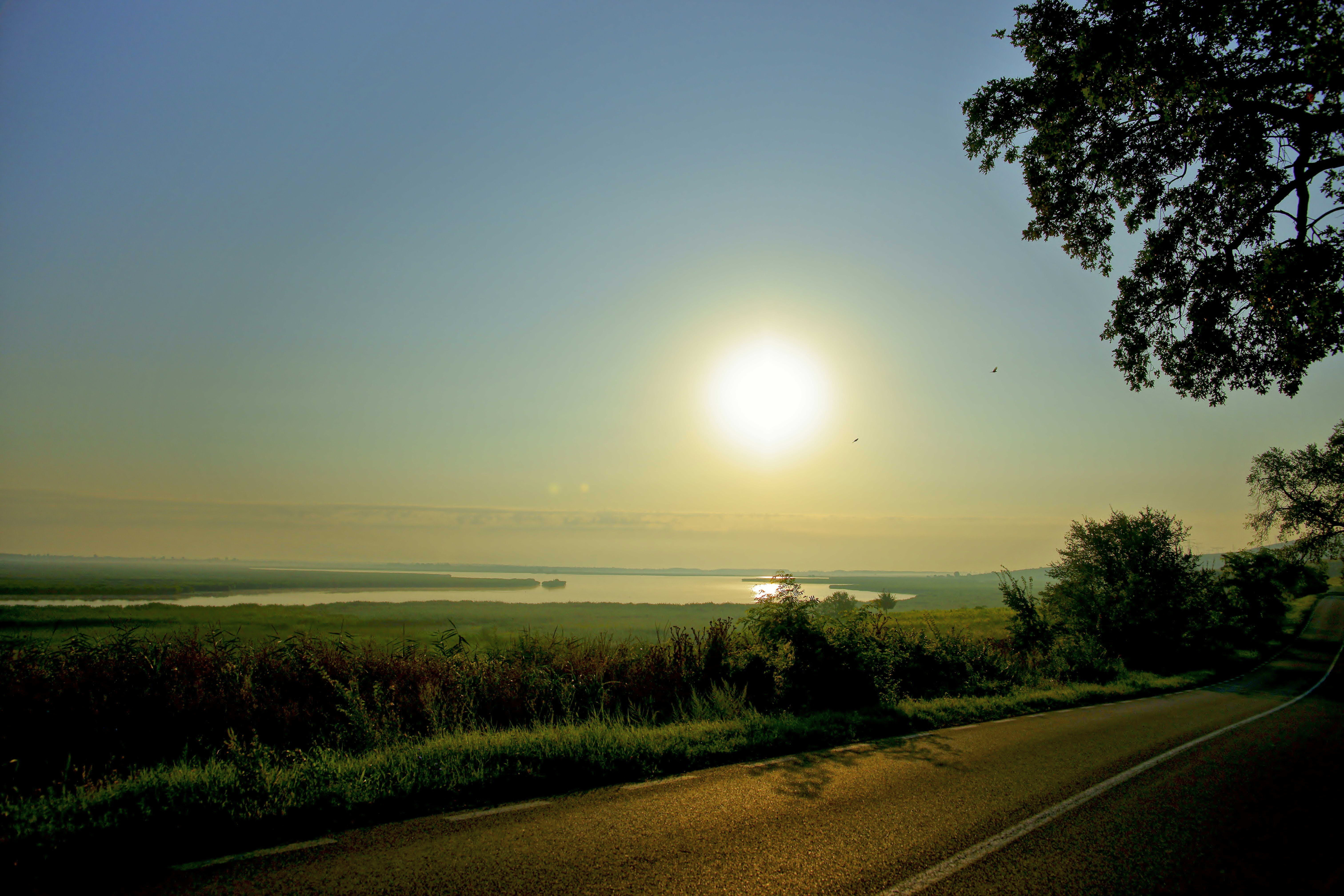 Sunrise to Isaccea - Rasarit spre Isaccea